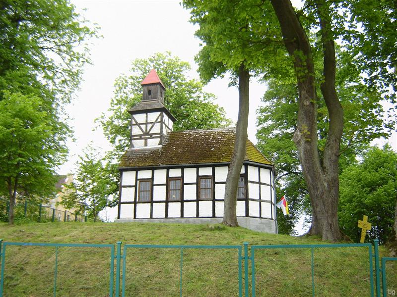 Dobrowo - kościół ewangelicki, obecnie rzymskokatolicki p.w. św. Jana Kantego